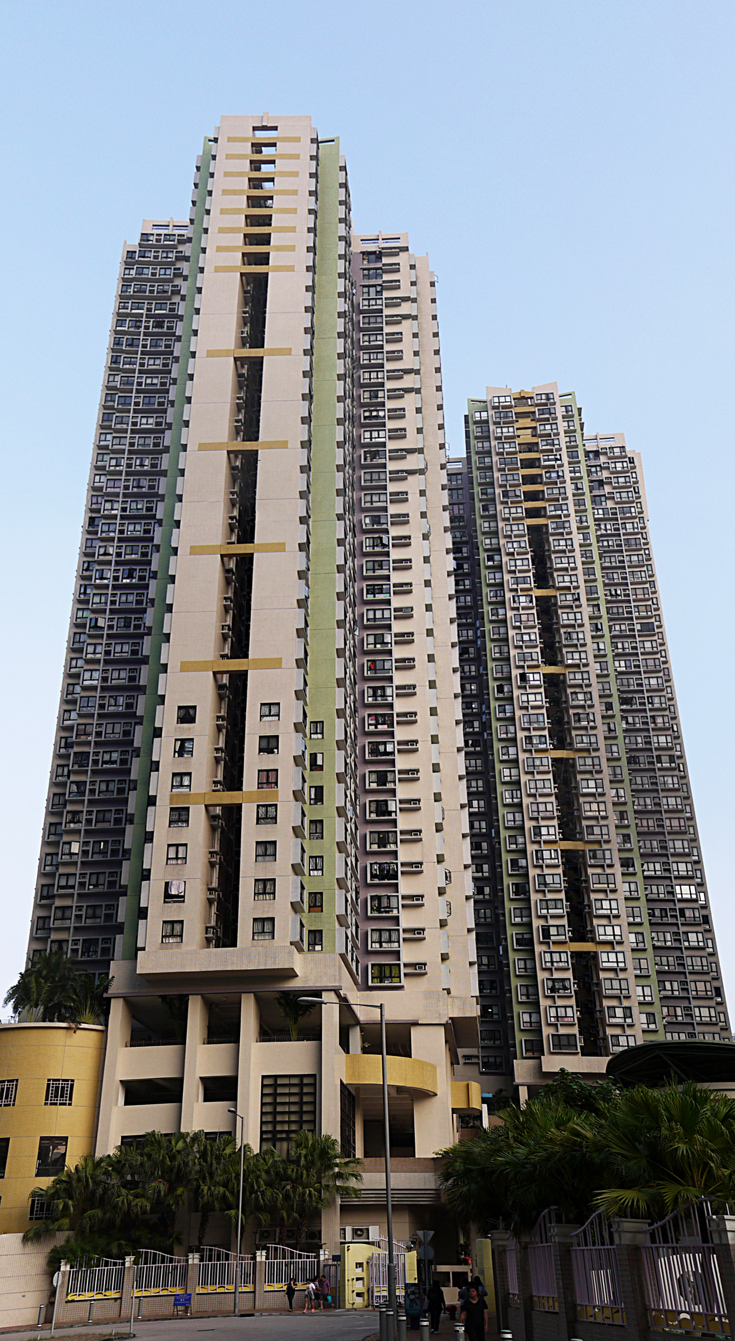 中文（香港）: 夾心階層住屋計劃---晴碧花園